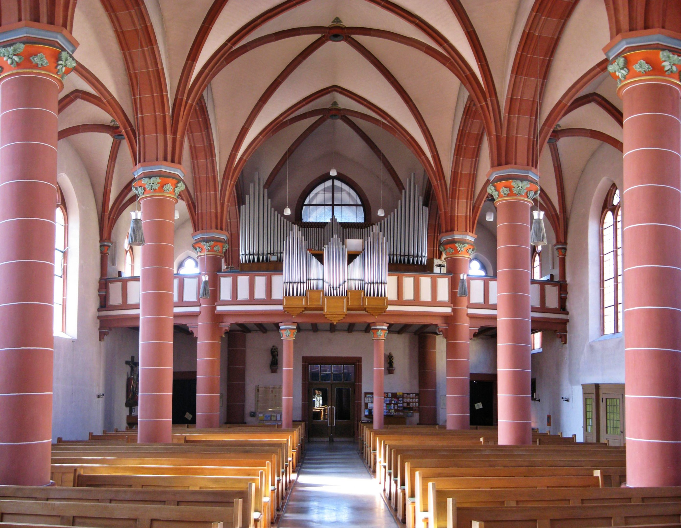 Kirche in Pachten